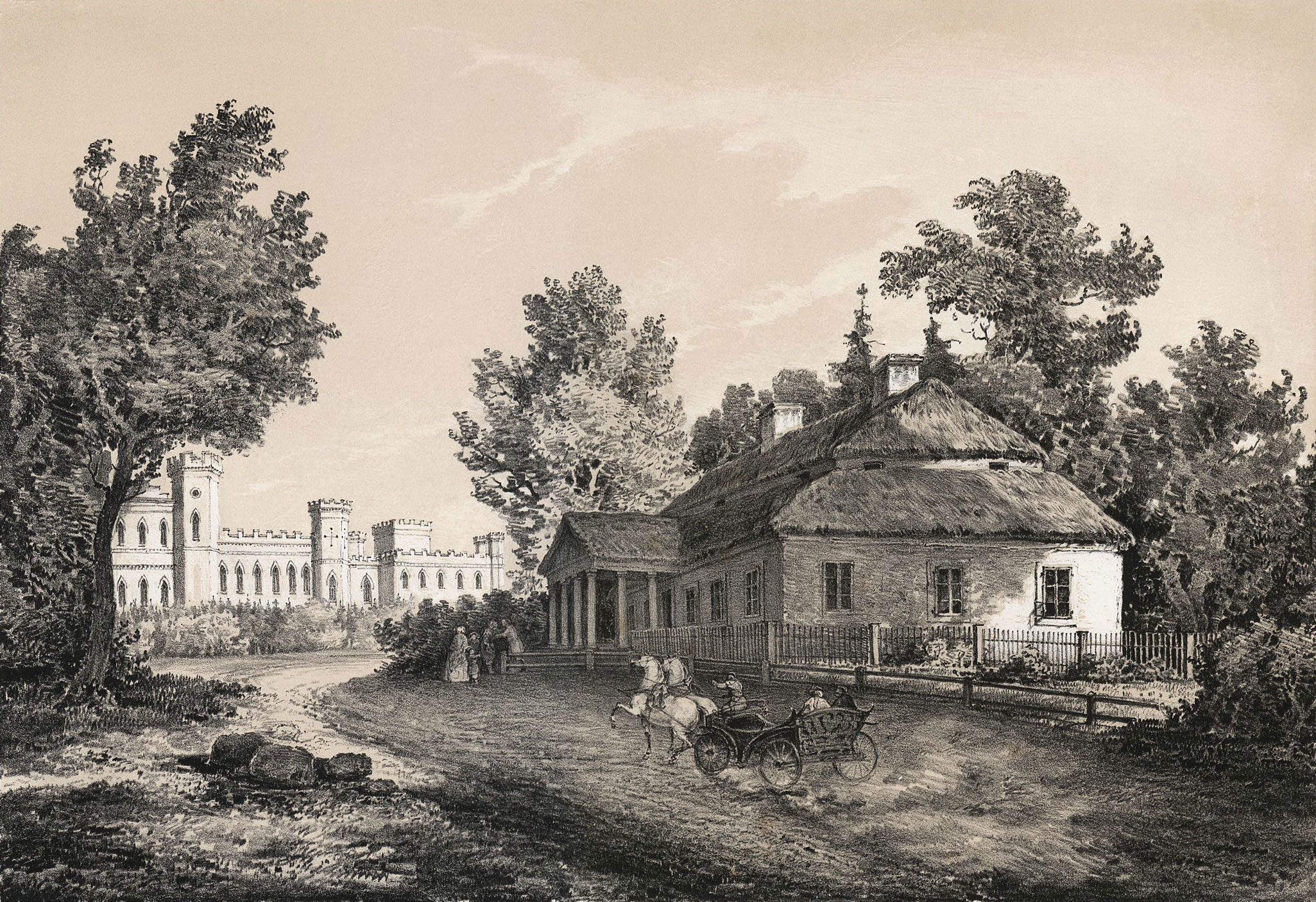 Беларуская (тарашкевіца): Косаў (Kosaŭ), Марачоўшчына (Maračoŭščyna). Сябдзіба Касьцюшкаў (Kaściuška)